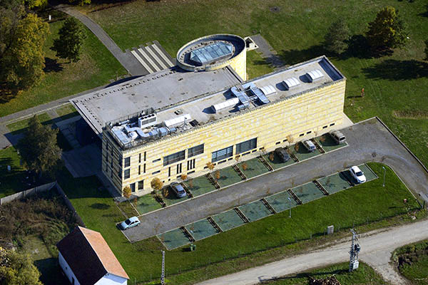 A Magyar Nyelv Múzeuma, Széphalom